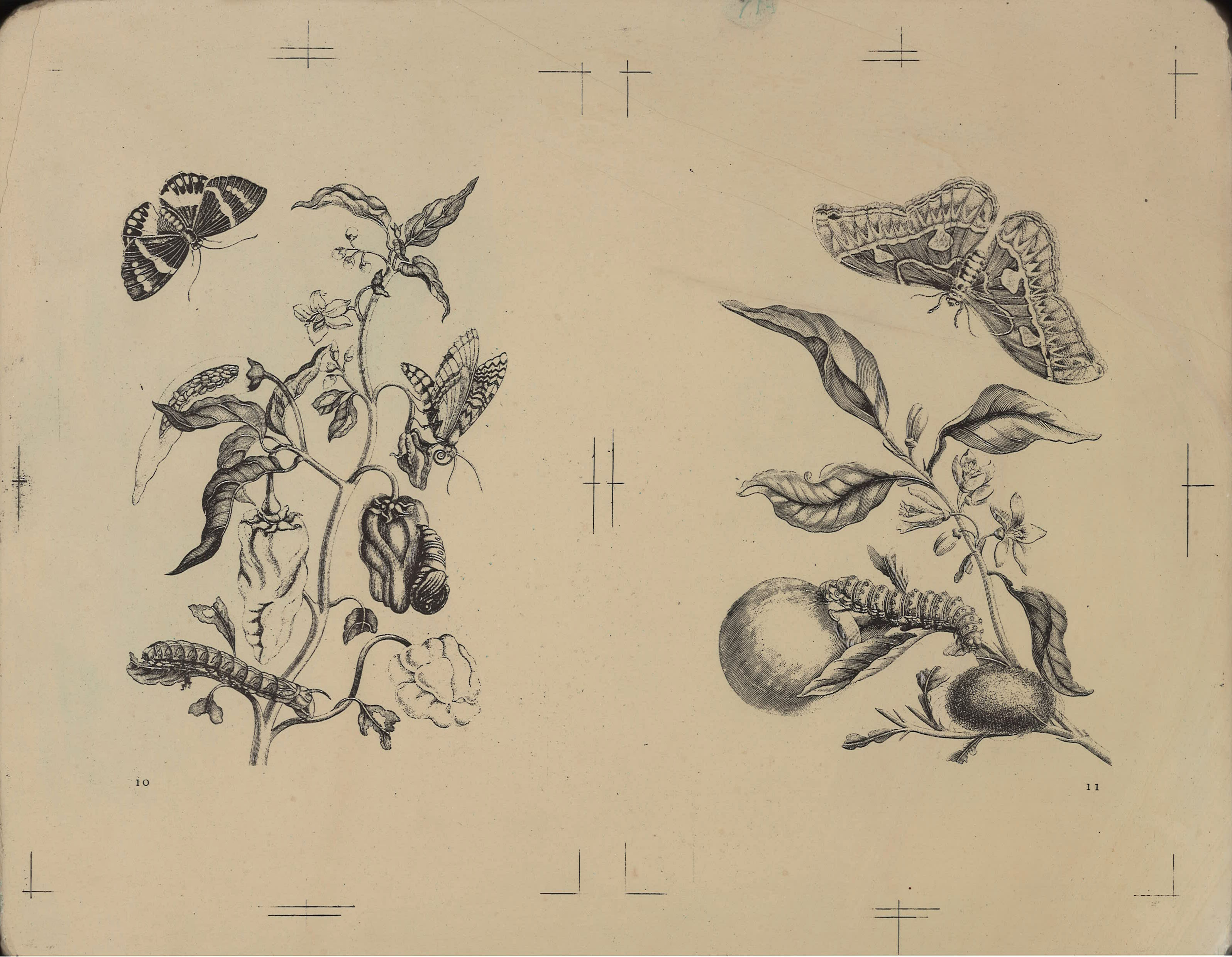 Scan eines Lithosteins für den Druck der Bildtafeln in IB 351/2 Sibylle Merian: Tropenwunder Date